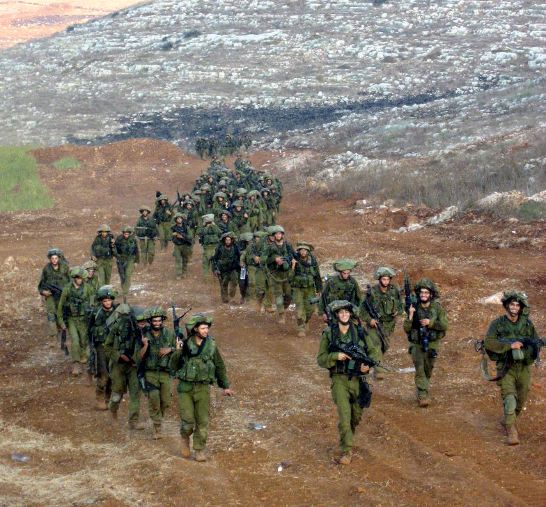 חיילים מגדוד גרניט של חטיבת הנח"ל חוזרים מלבנון לאחר סיום המלחמה, אוגוסט 2006